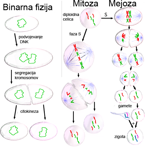 Shema treh načinov celične delitve